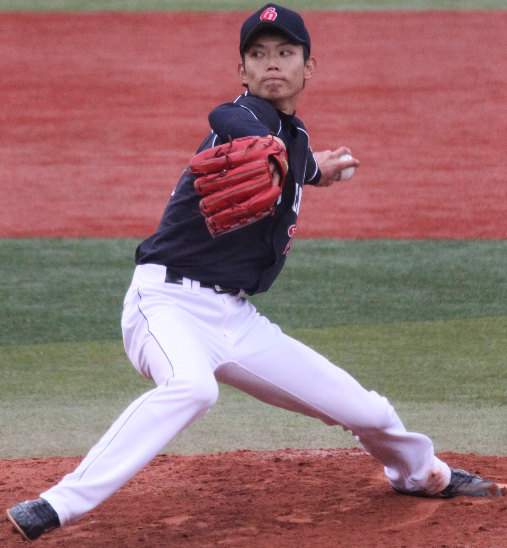 中日ドラゴンズ投手の岡田俊哉。横浜スタジアムにて。